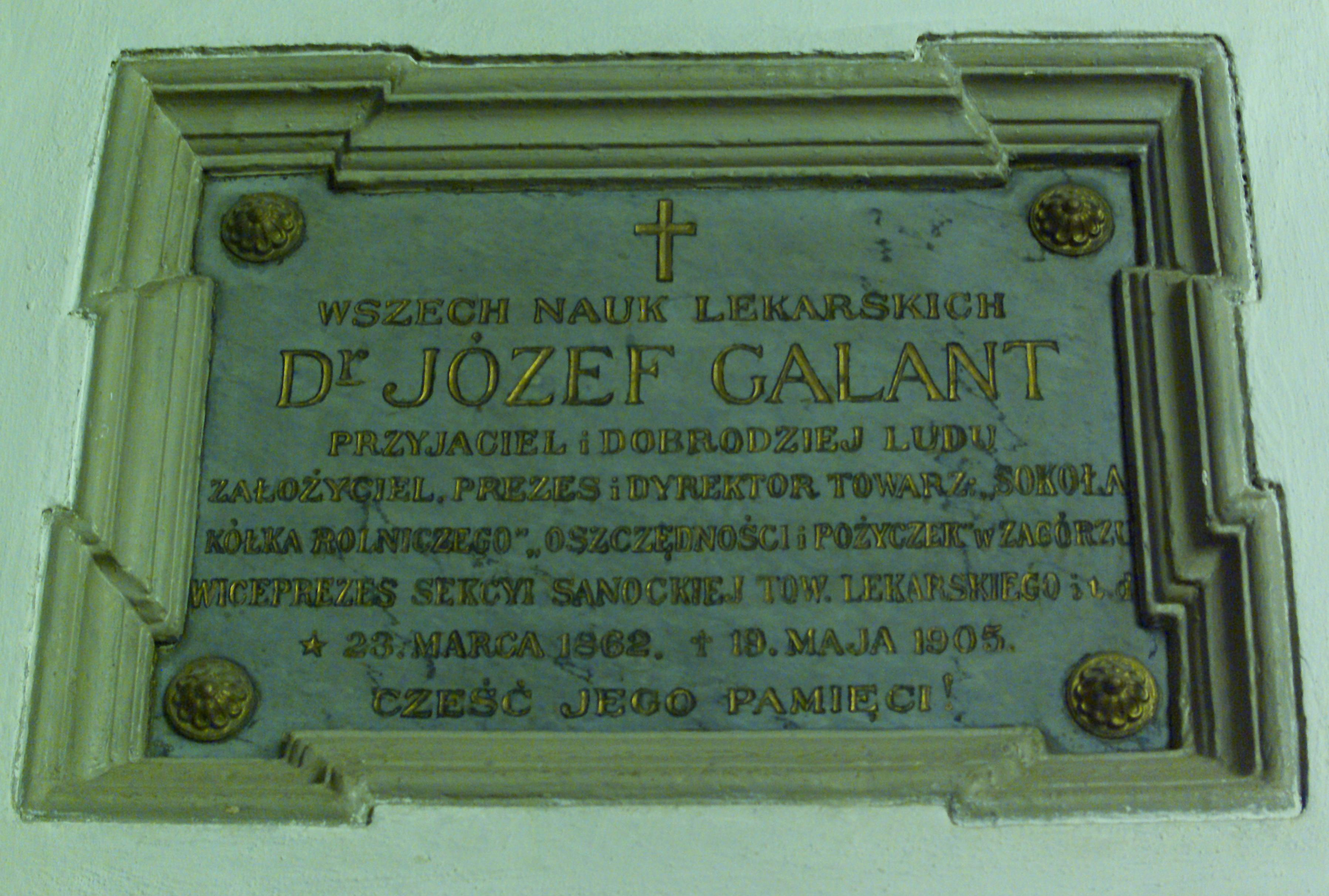 Tablica pamiątkowa w kościele Wniebowzięcia Najświętszej Maryi Panny w Zagórzu - upamiętnia dra wszechnauk lekaskich Józefa Galanta